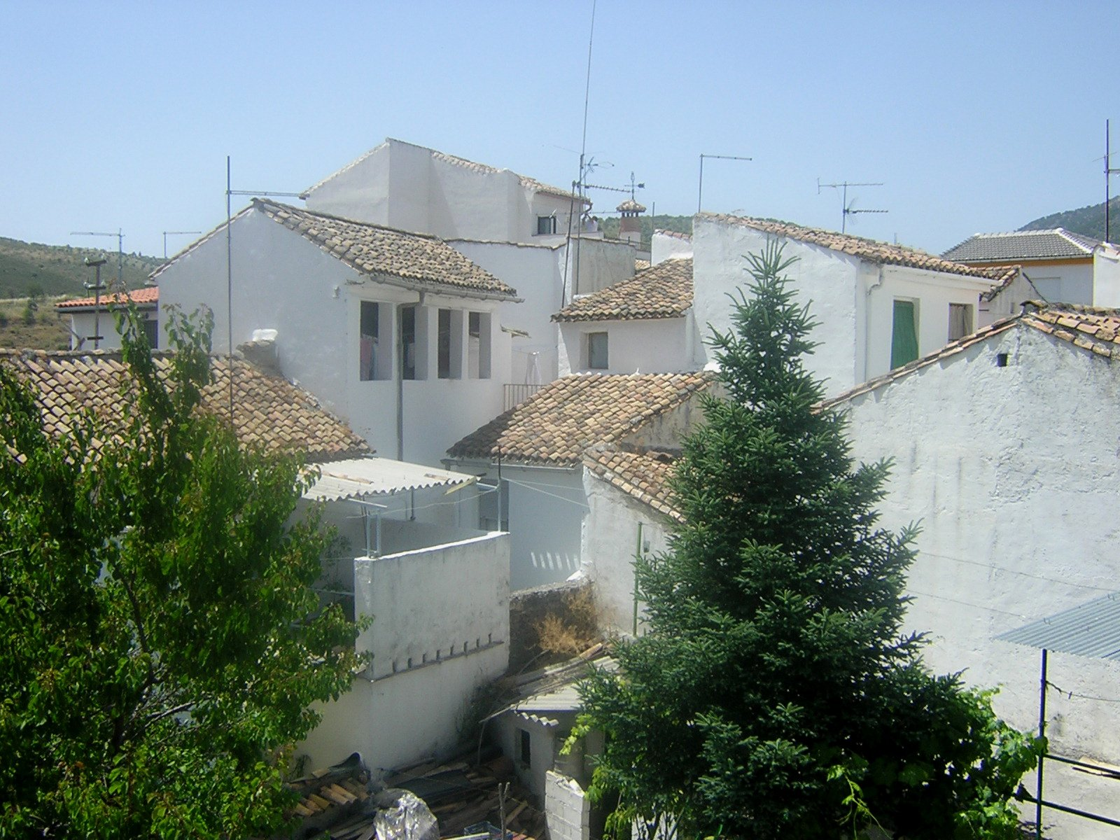 Huétor Santillán, a 15 km de Granada (España). Más info: [1]